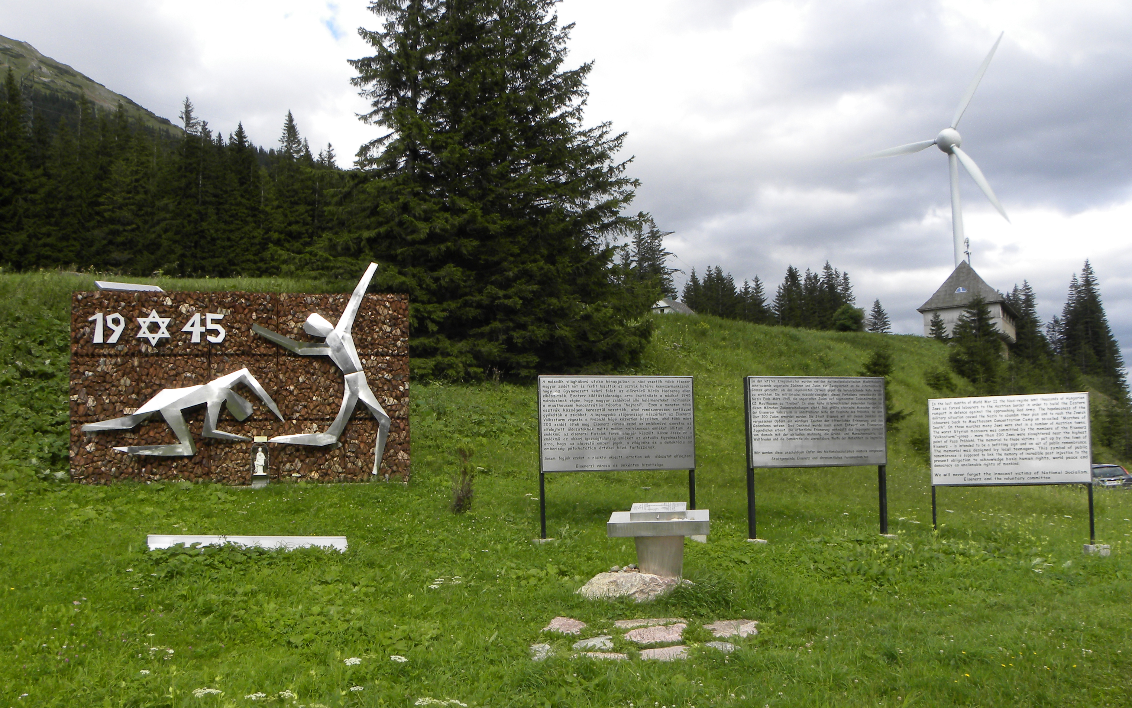 Gedenkstätte für 200 im Jahr 1945 auf dem Todesmarsch am Präbichl vom Eisenerzer Volkssturm ermordete ungarische Juden.